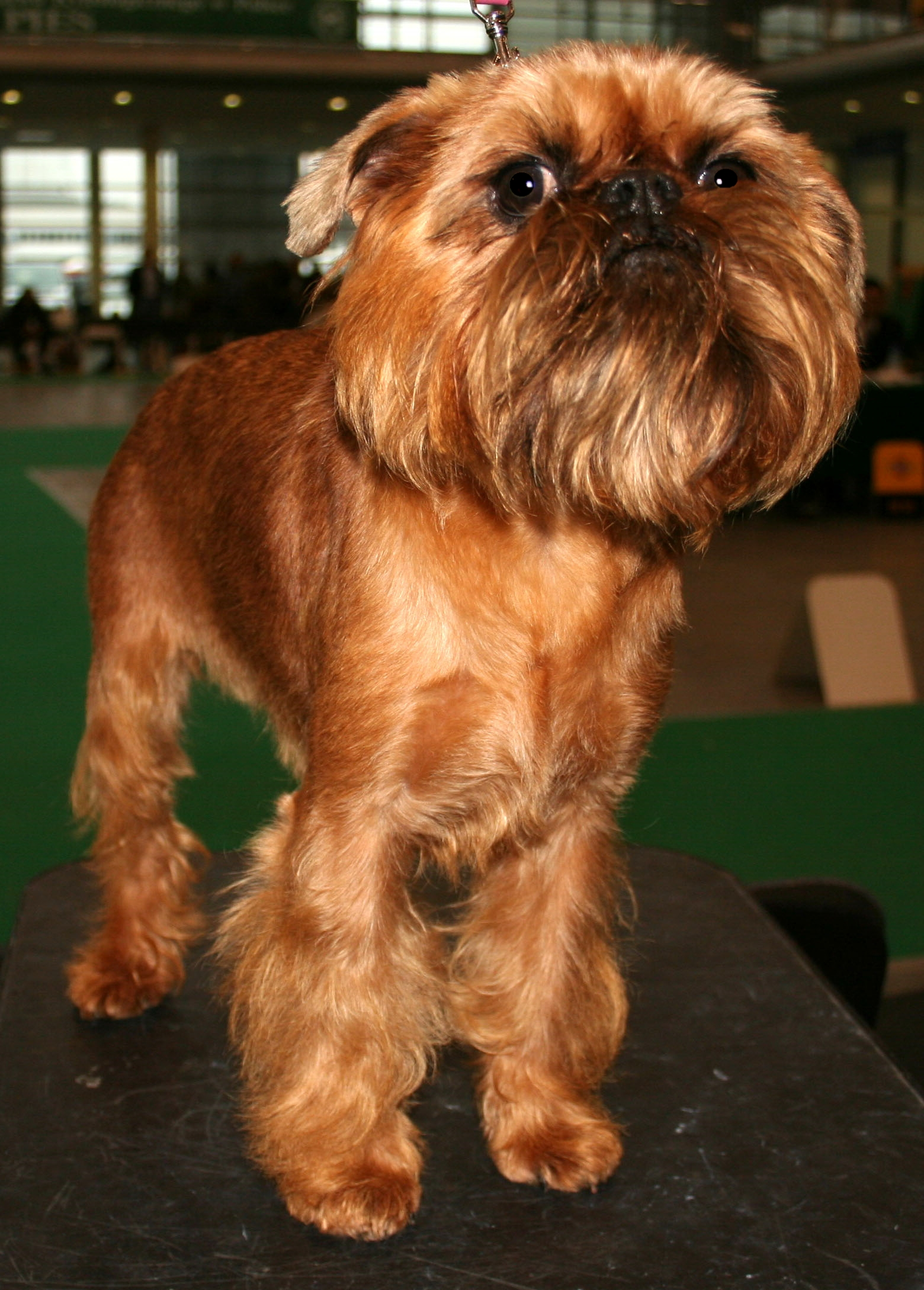 Gryfonik_brukselski na Światowej Wystawie Psów Rasowych w Poznaniu